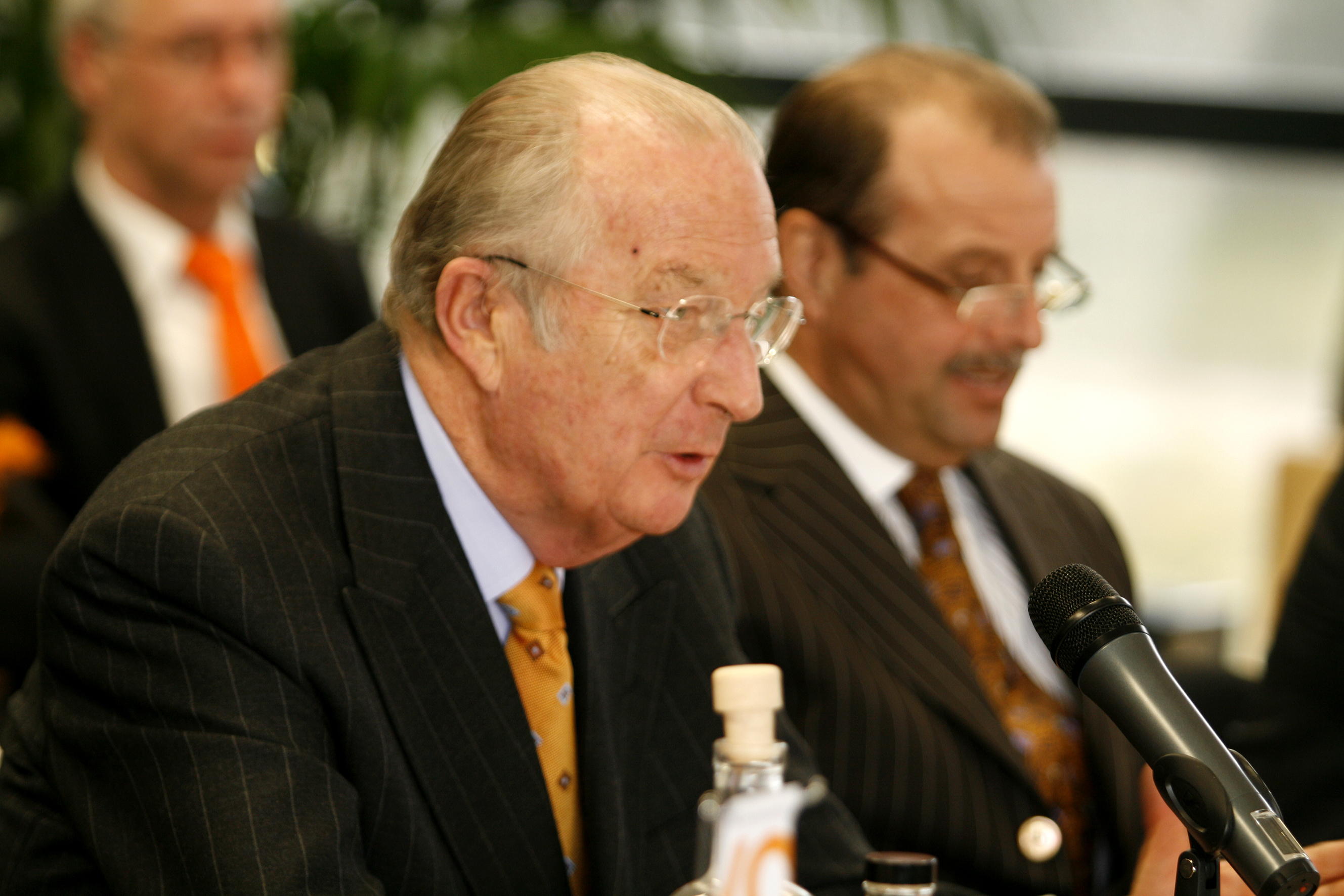 Koning Albert bezoekt Voka Limburg